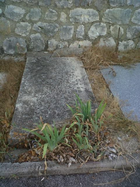 Tombe du général Le Vigan, grande figure de la résistance française, et à la ville Pierre Herbart, grande figure de la littérature française. Cabris. Août 2013